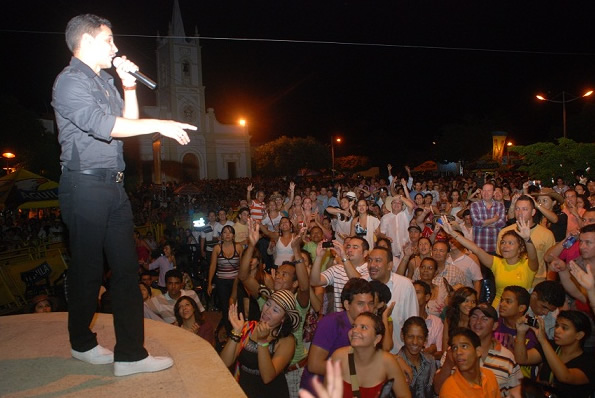 Festival Cuna de Acordeones Villanueva La guajira